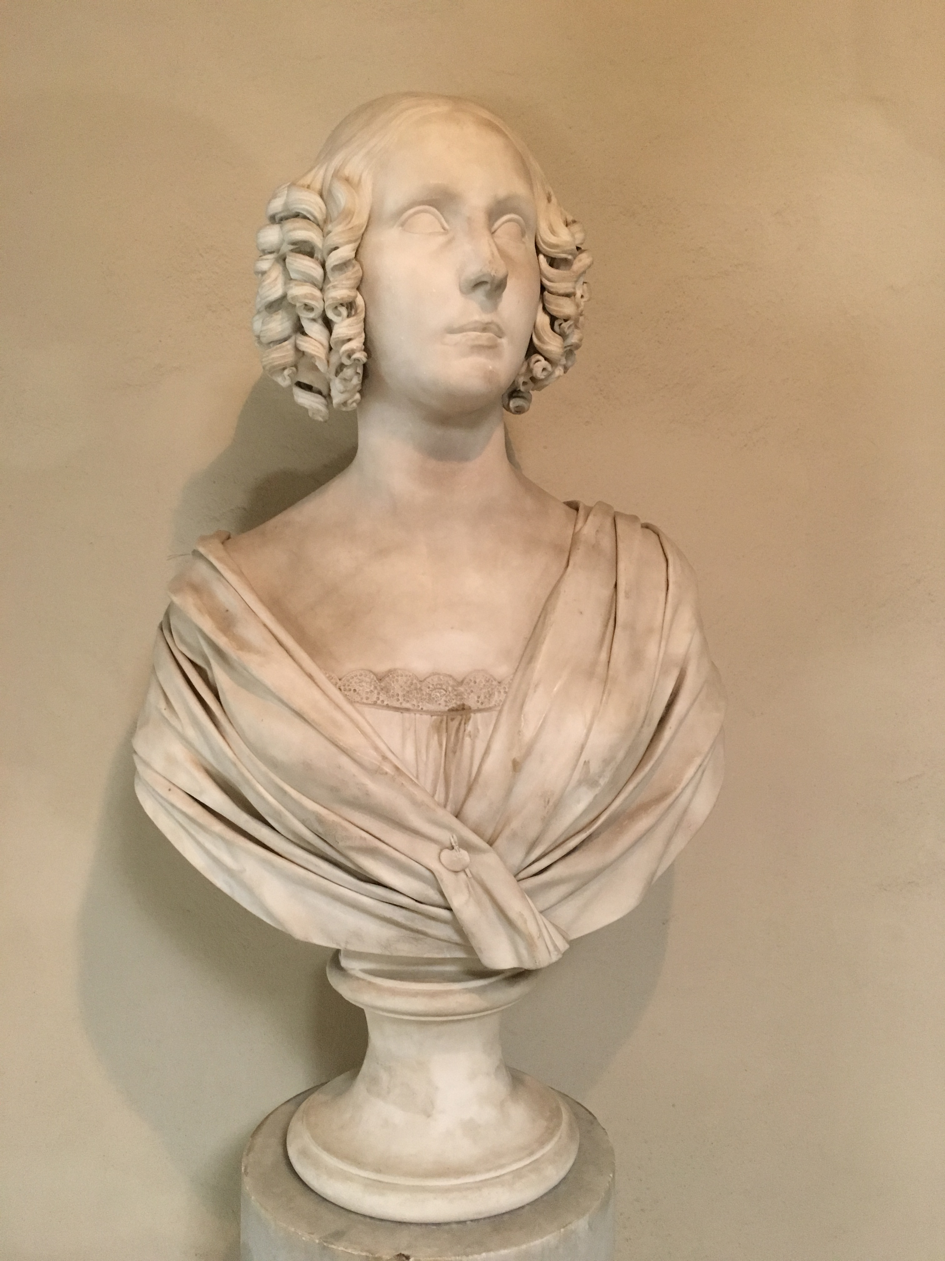 Monumento funebre a Idda Botti, di Pietro Freccia